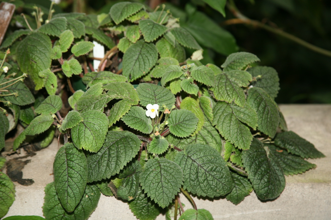 (Niphaea oblonga) Gesneriaceae Family